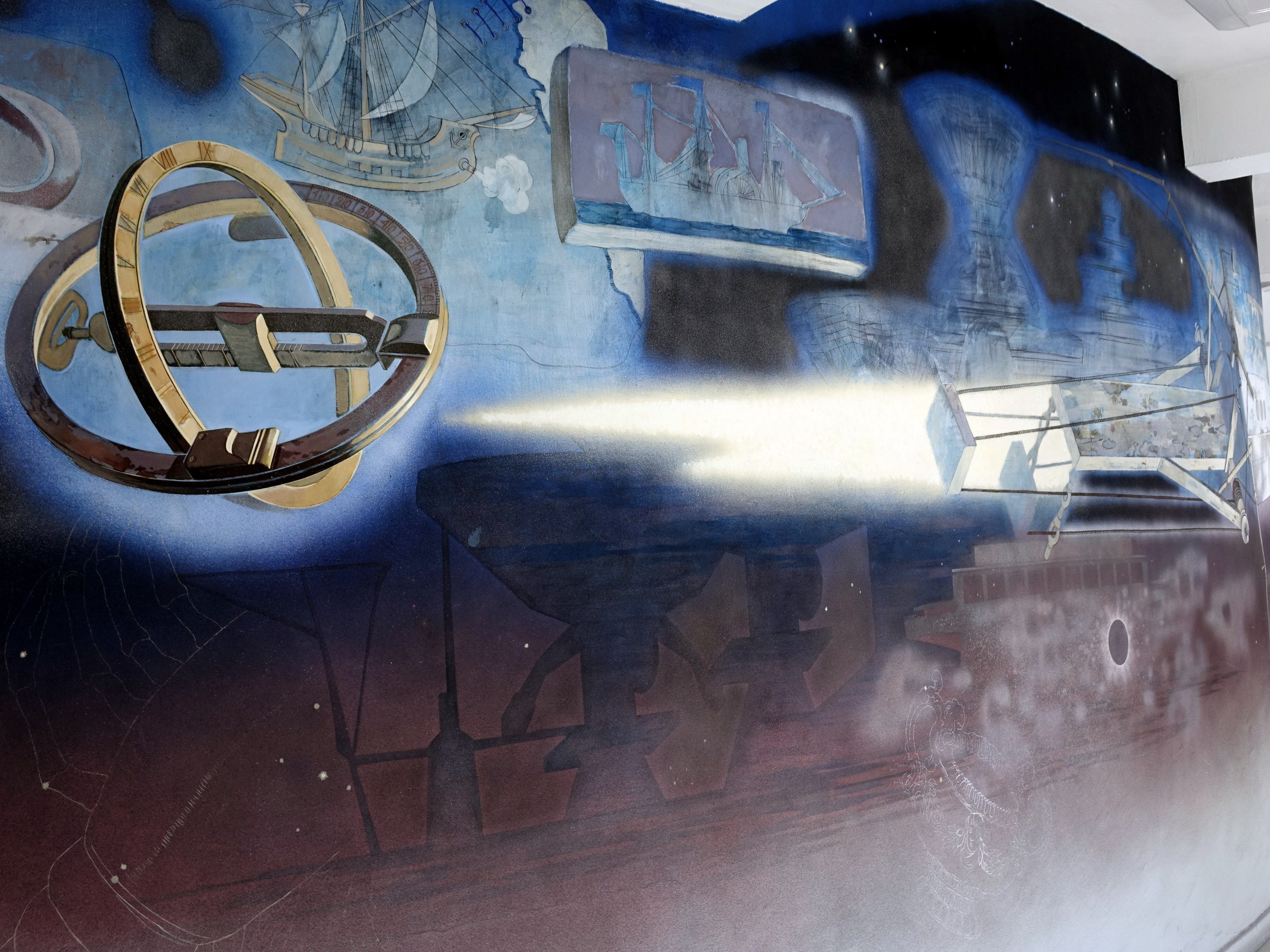 Планетариум ВВМУ Стенопис 3